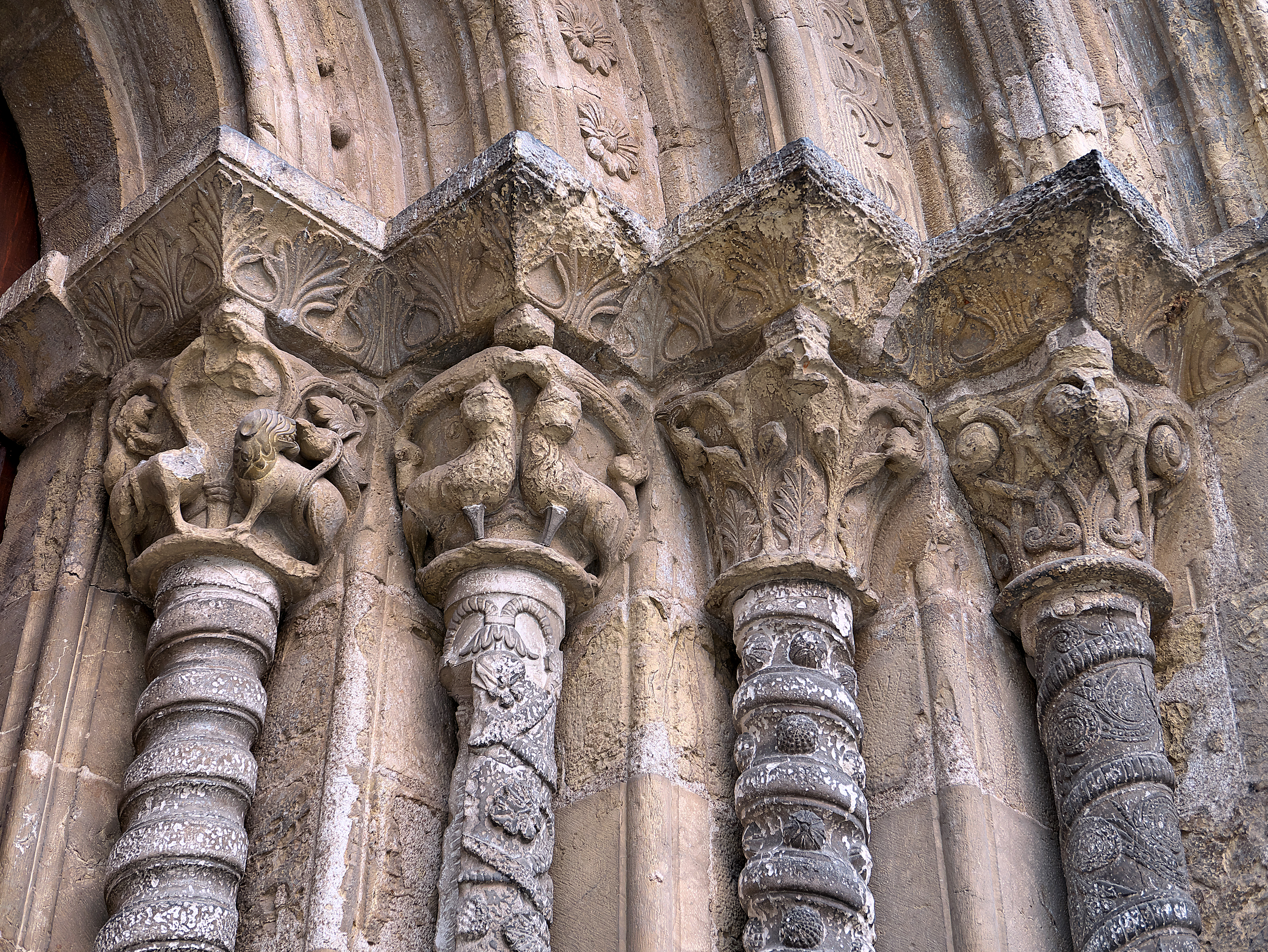 Portada occidental, lado meridional. Columnas y capiteles románicos significativos de finales del siglo XII.